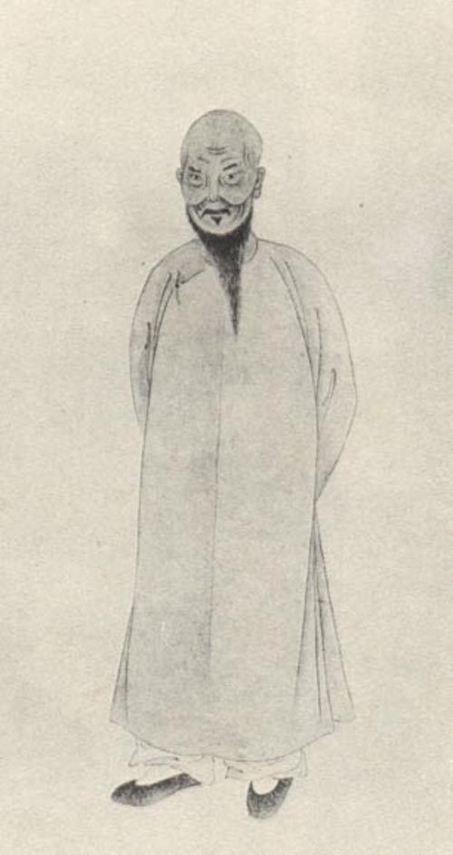 徐松，清朝學者。Xu Song